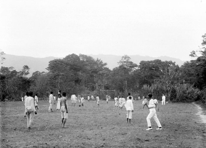 Negatief. Voetballende schooljeugd op Zuid-Boeroe